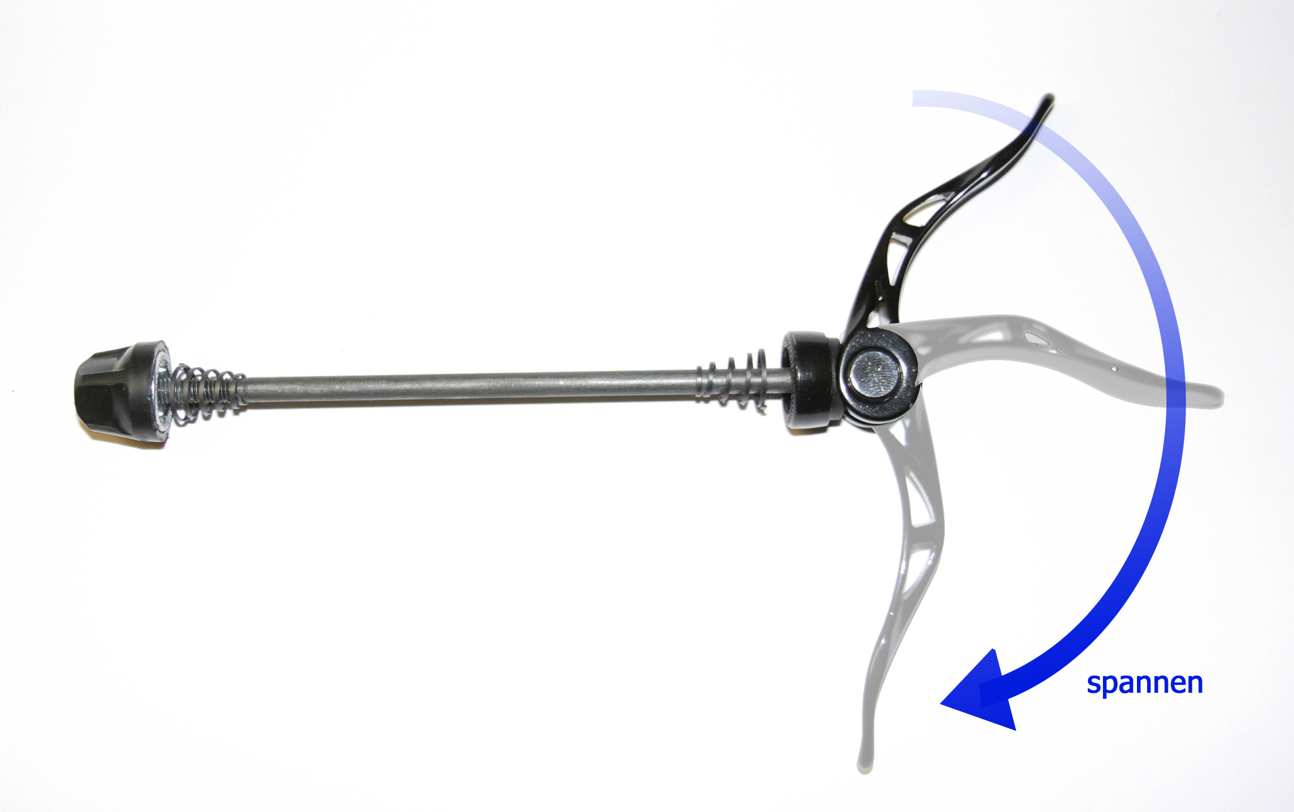 Illustration zur Schnellspannachse eines Fahrrades